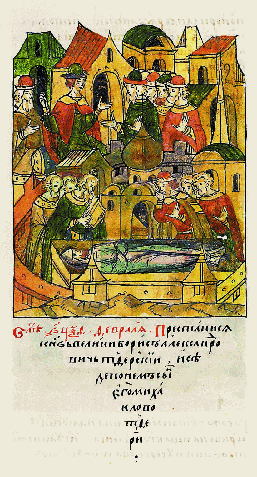 В 6969 году, в фев- рале, скончался великий князь Бо- рис Александрович Тверской, и сел после него в Твери сын его Михаил.